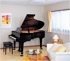 Soundproof Rooms (Avitecs™)